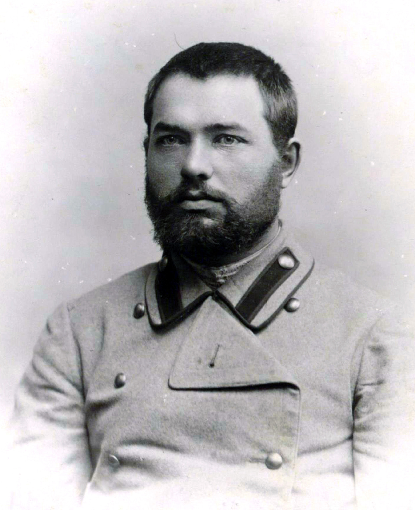 Павел Петрович Вопилов (1878, Оренбургская губерния — после 1907) — крестьянин, сельский учитель, депутат II Государственной думы Российской империи от Оренбургской губернии (1907).